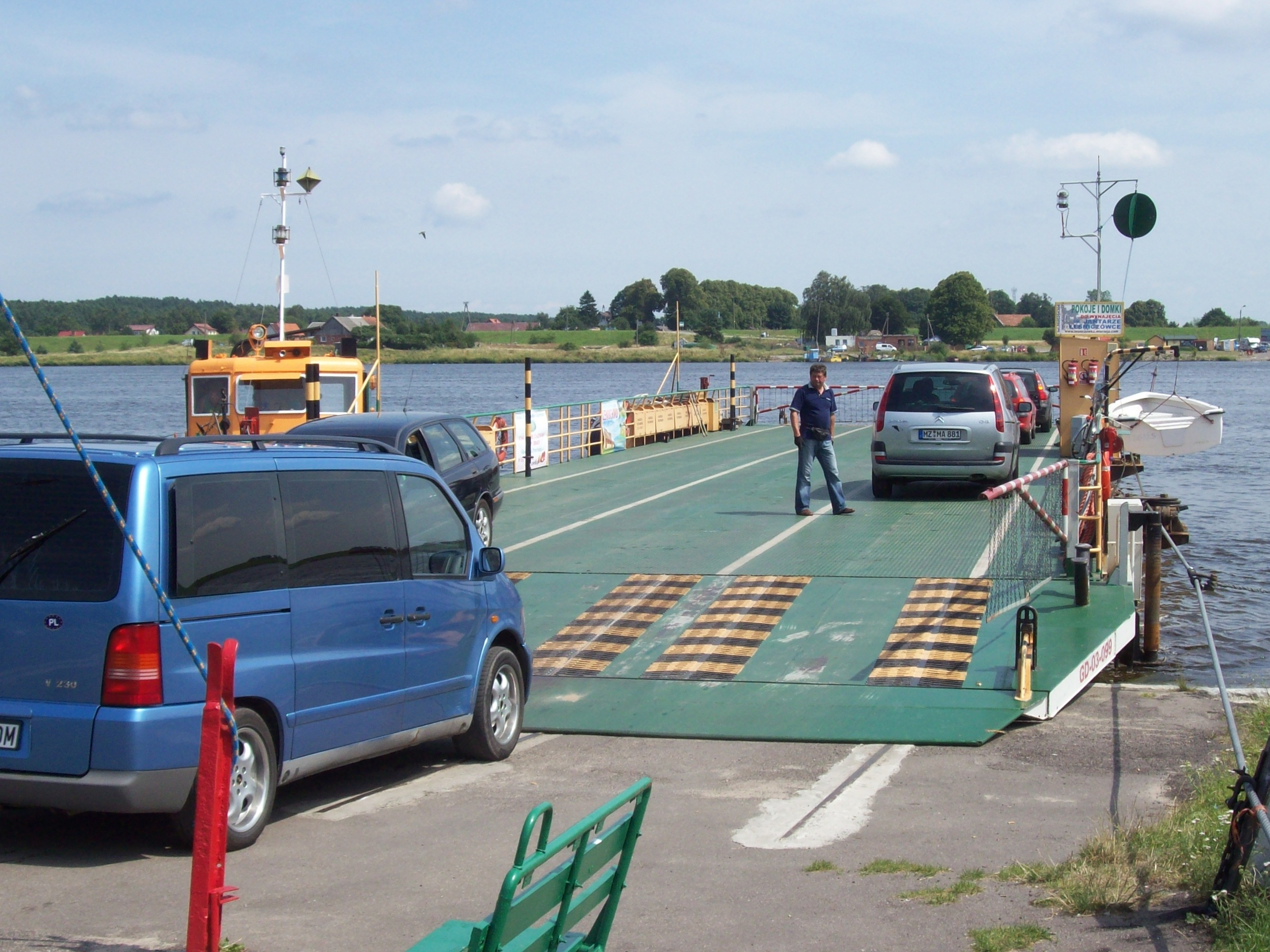 Wisła ferry